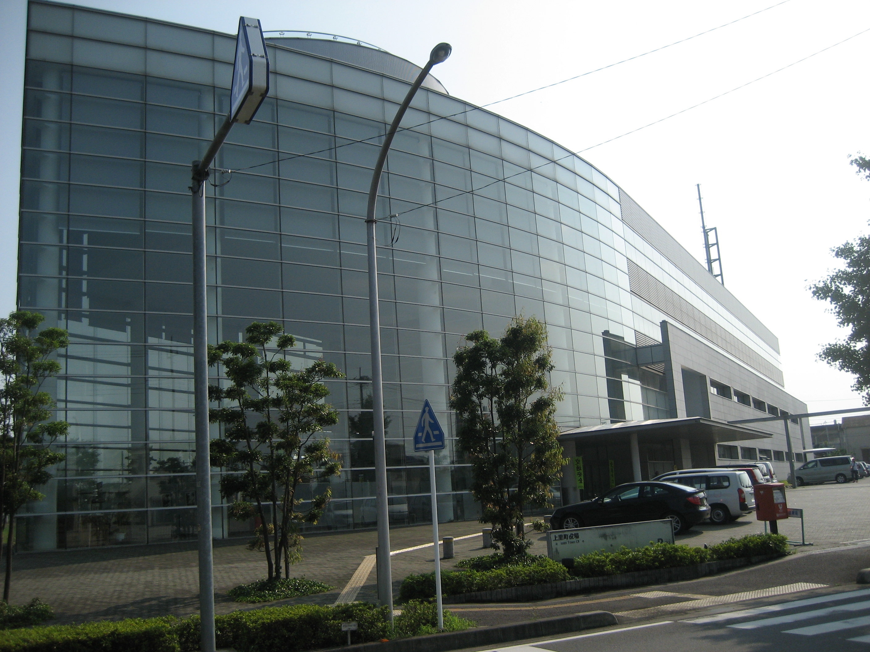 埼玉県上里町役場